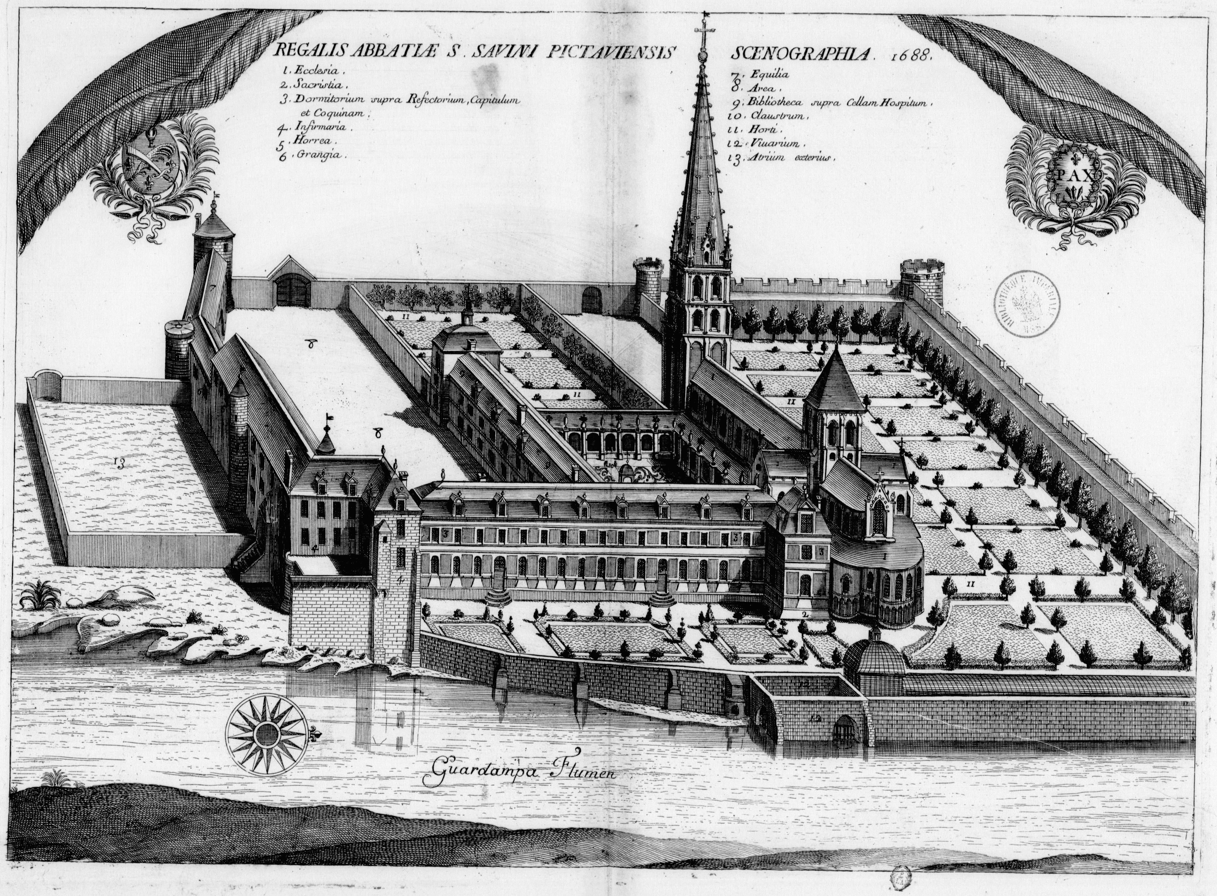 Planche gravée du 17ème siècle représentant l'abbaye de Saint-Savin-sur-Gartempe, en France, dans le livre Monasticon Gallicanum.